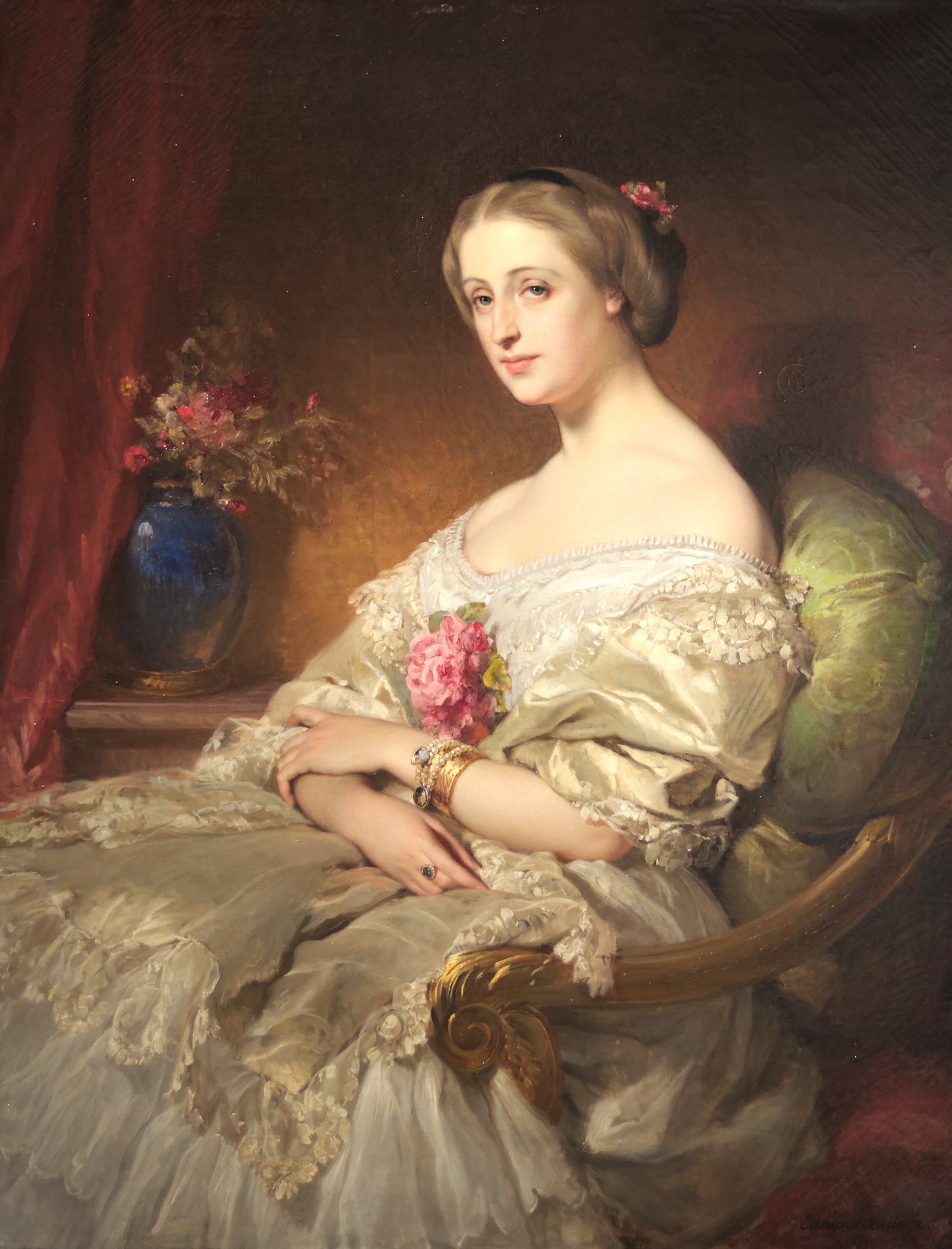 La Comtesse de Beaussier Edouard Louis Dubufe. S.D.b.d "Edouar Dubufe 1850". Leg du Teil 1936. Inv A.831.